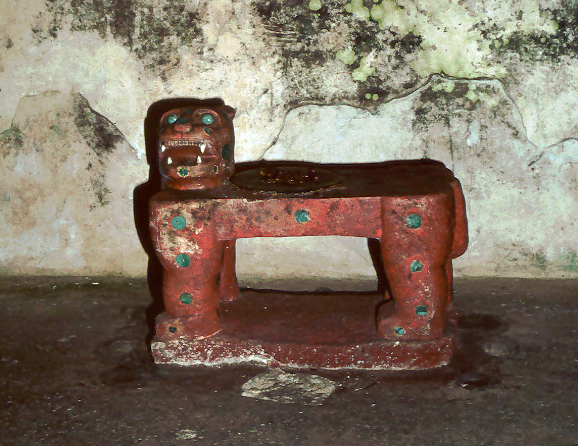 Trono de Jaguar en El Castillo, Chichen Itza.